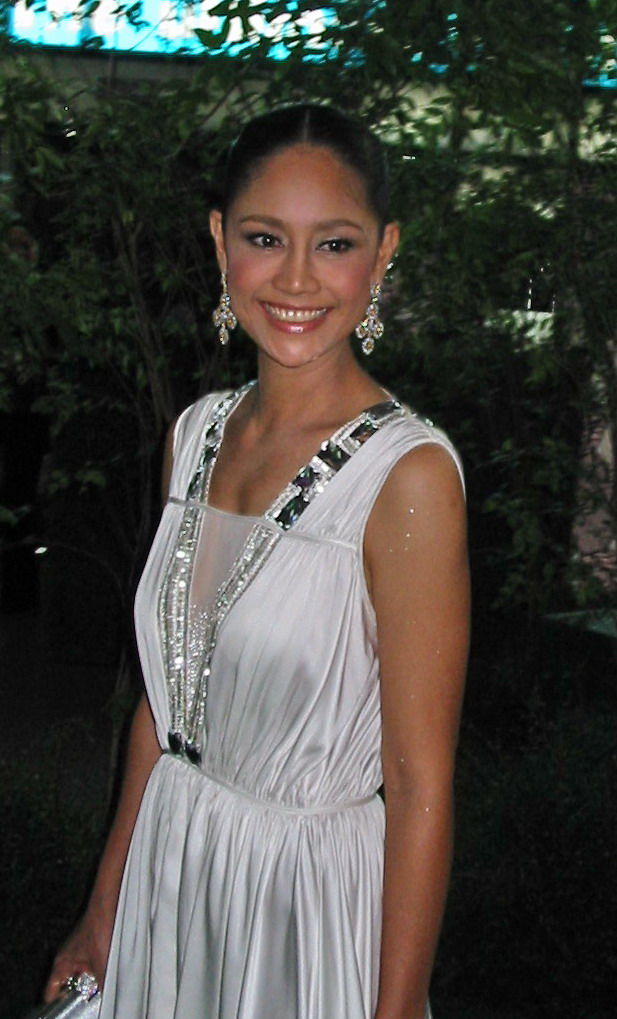 Sinjai Plengpanich at Star Entertainment Awards 2007